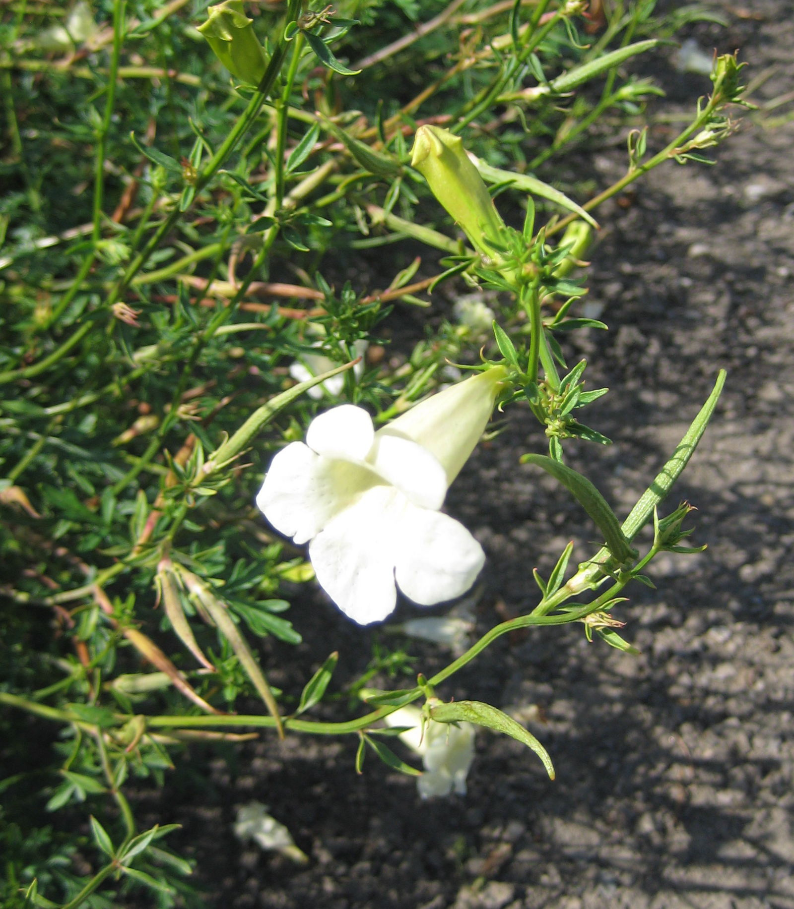 Incarvillea sinensis var. przewalskii im Botanischen Garten Dresden